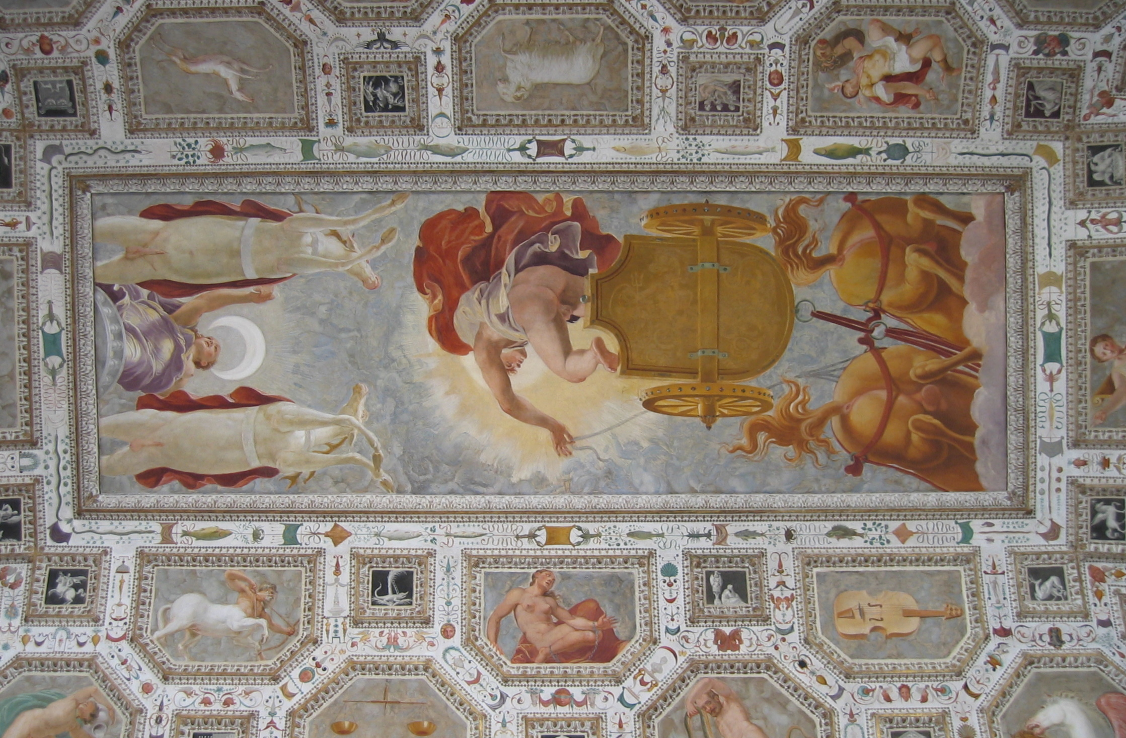 Fresco op het plafond in het palazzo Chiercati. Eigen foto: oktober 2006